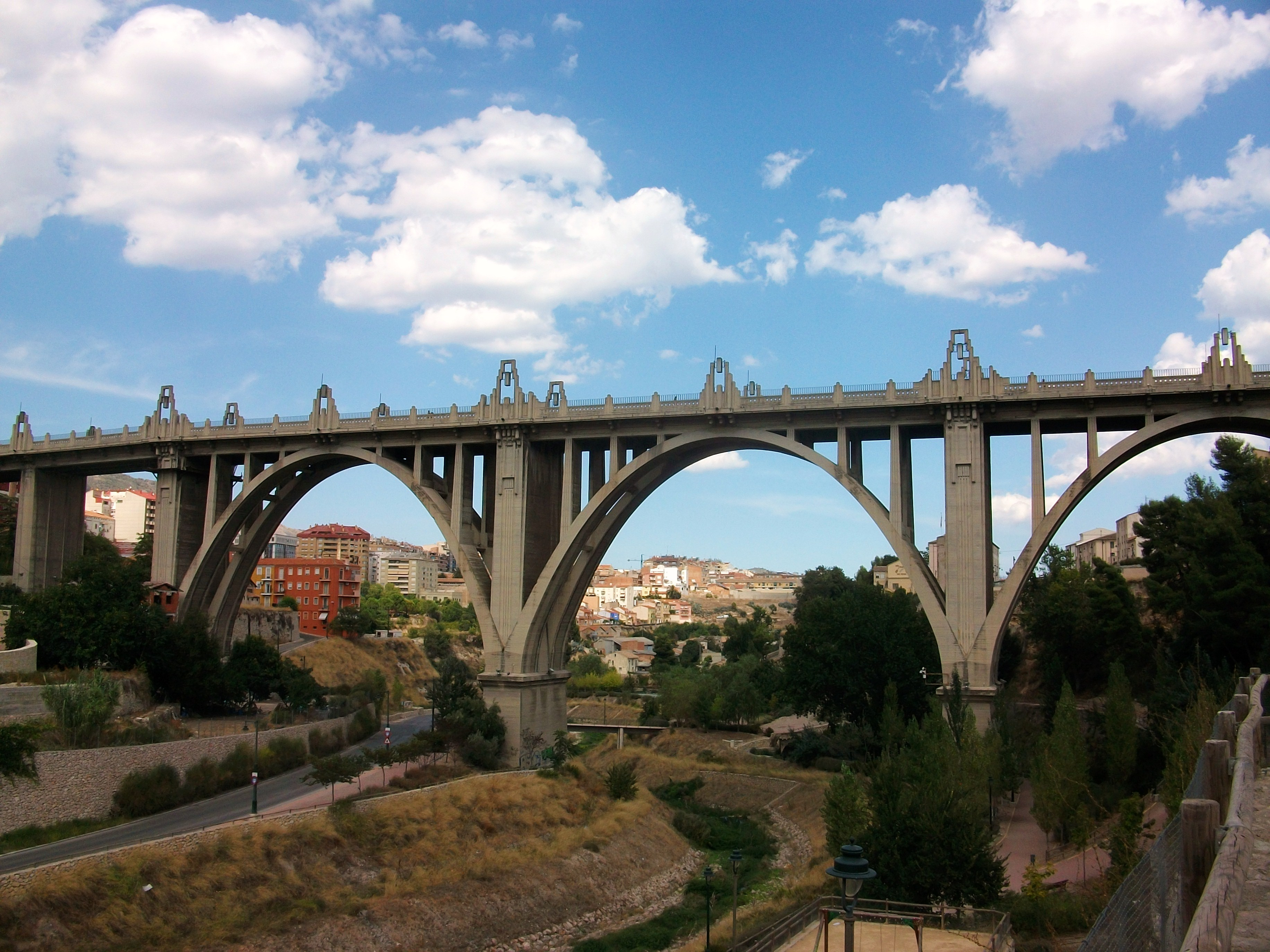 Pont de Sant Jordi, Alcoi, País Valencià.